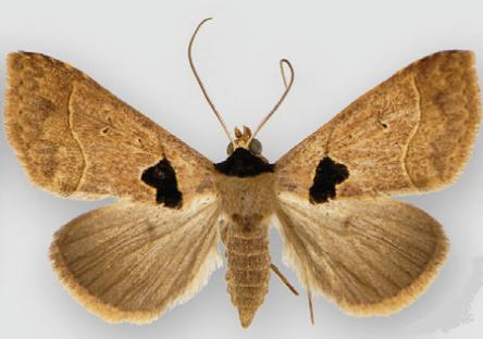 Anoba sp. trigonoides species complex, female